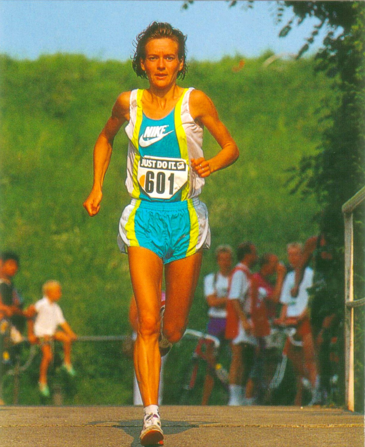 Joke Kleijweg tijdens het NK 15km in Grootebroek 1991